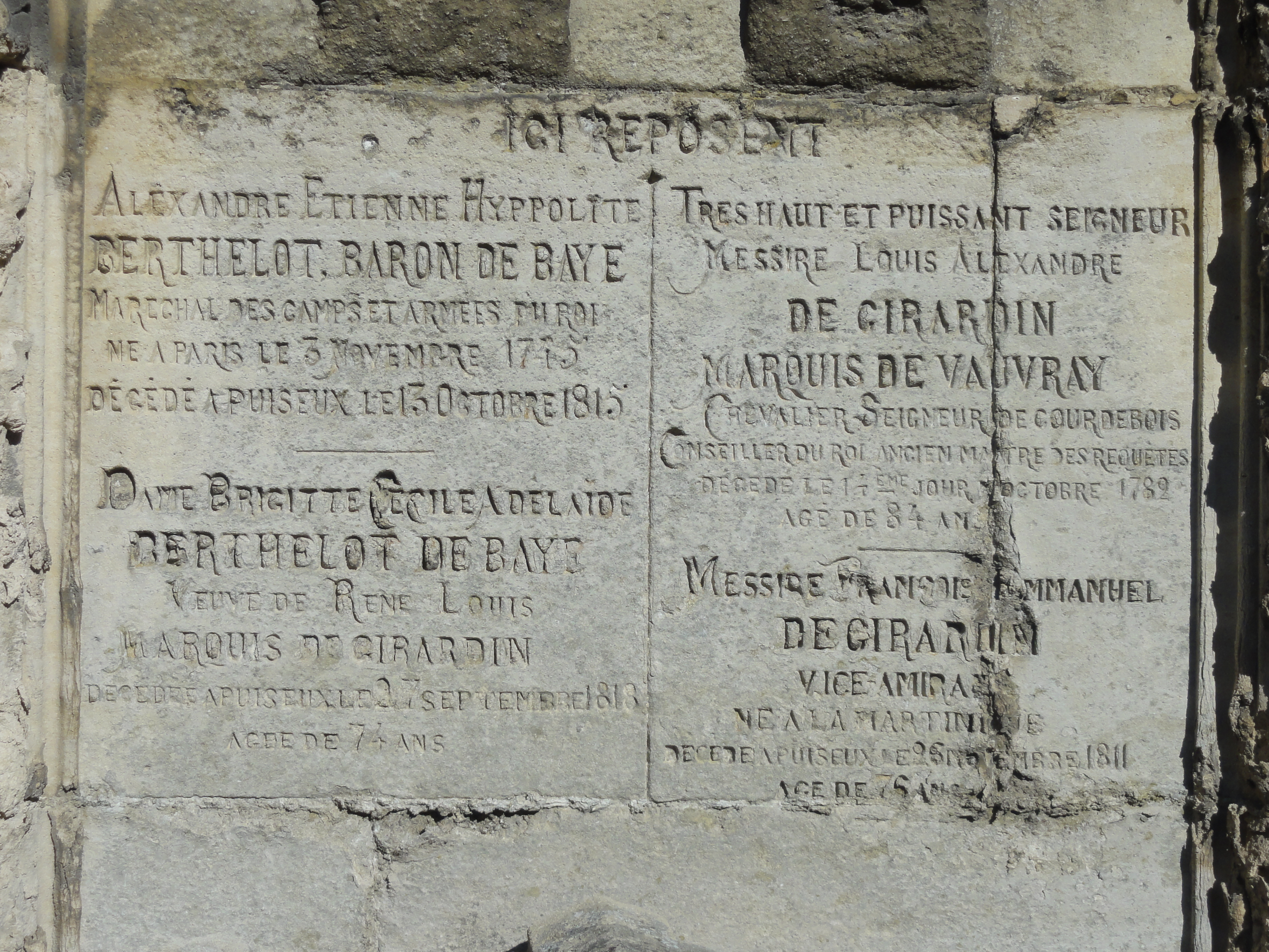 Monument funéraire des familles Berthelot de Baye et de Girardin.